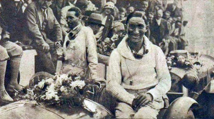 Goffredo Zehender, vainqueur des 6 Heures des Routes pavées en 1929.